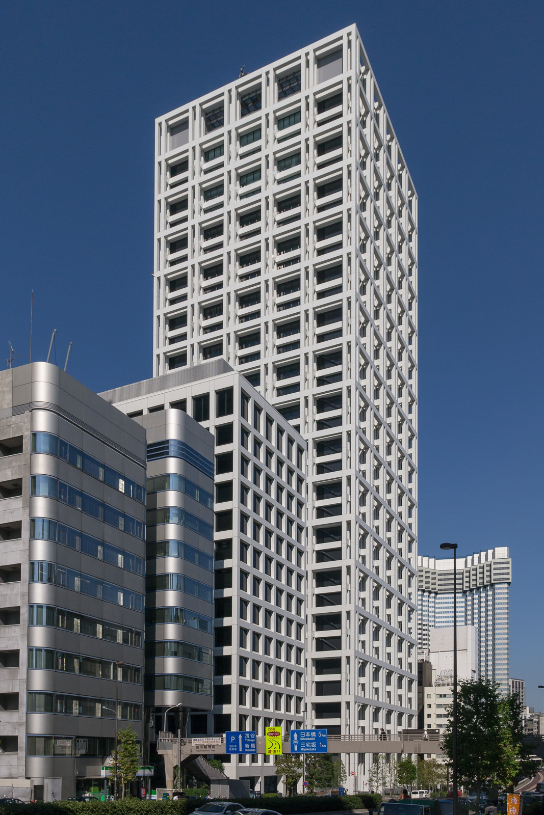 赤坂Kタワー、鹿島建設旧本社跡地に建つオフィスビル兼集合住宅、東京都港区元赤坂。